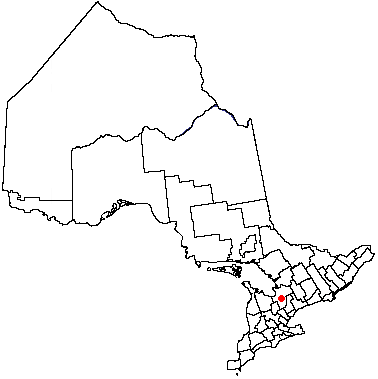 Barrie, Ontario